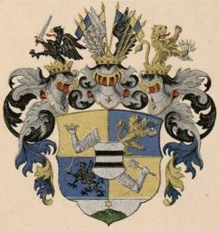 Mengdeni suguvõsa vabahärravapp.